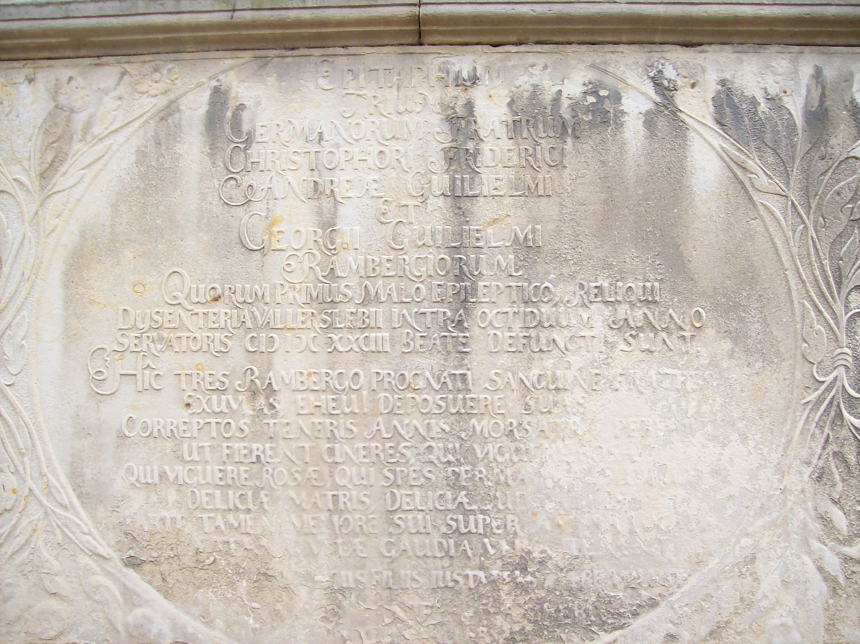 Ecclesia in vico Heiligendorf prope Wolfsburgum sito hoc epitaphium exhibet.